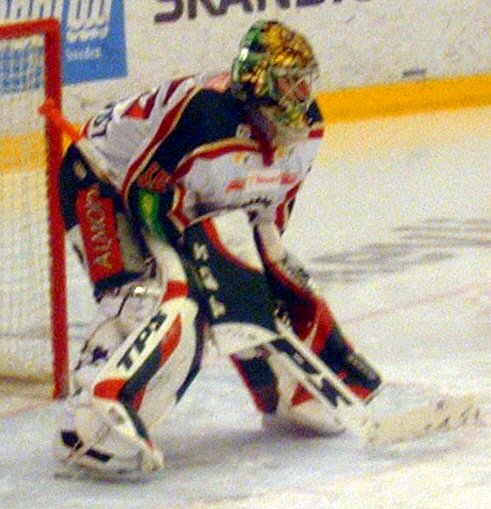 Lundqvist with Frölunda HC in E.ON Arena, Timrå, Sweden